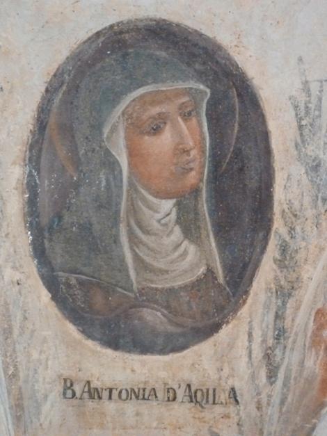 Fresque représentant la bienheureuse Antoinette de Florence dans le cloître du couvent des frères à Ocre (L'Aquila), Italie.